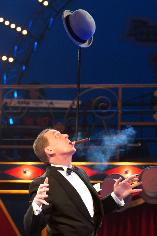 Der Gentlemanjongleur Jeton zeigt hier seine Zigarrenbalance. Zuerst balanciert er den Gehstock und die Melone auf seinem Fuß, dann schleudert er beides in die Luft und fängt es auf der mit dem Mund gehaltenen Zigarre zur Balance.